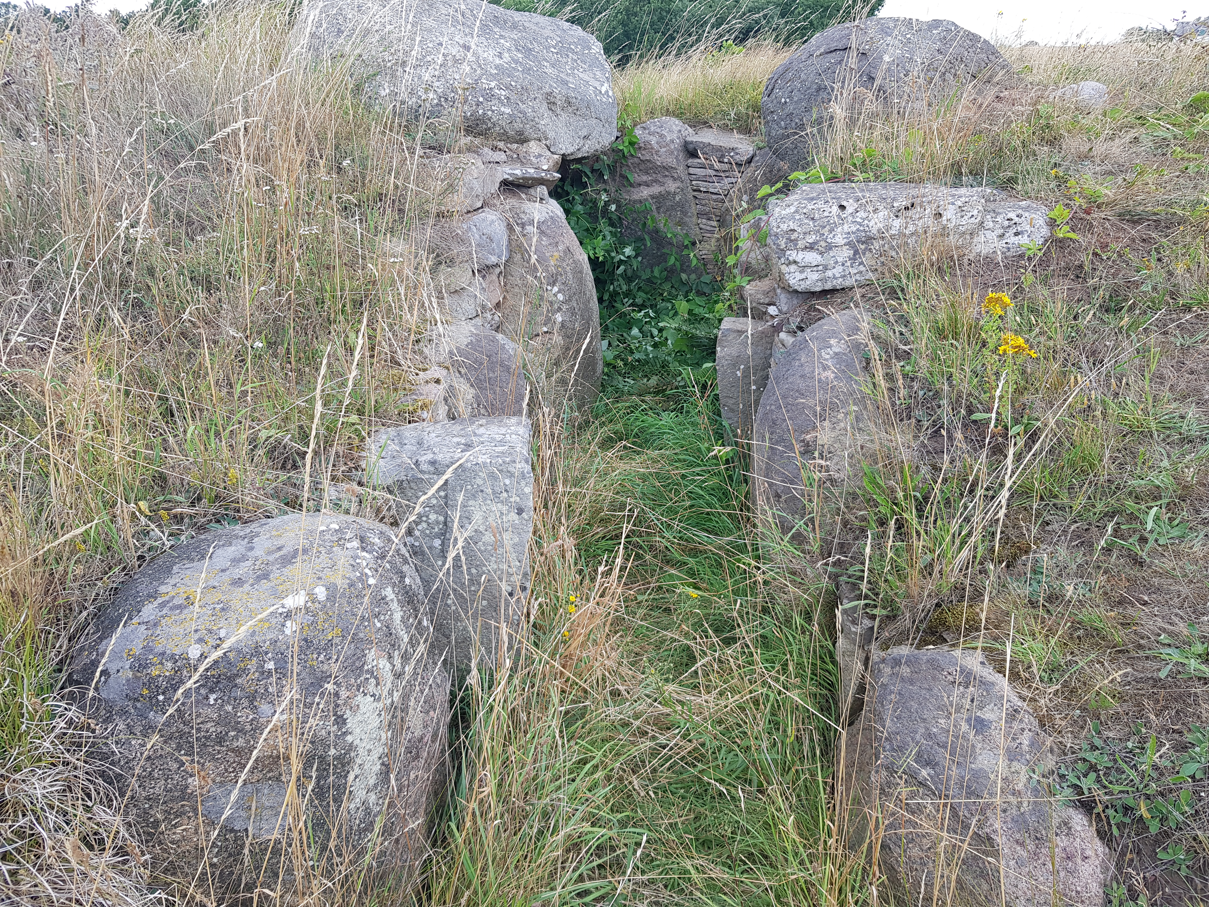 Jættestue ved Arnager (Jættestue), Grabanlage, Arnager, Bornholm. Lageort: Unweit des Flughafens